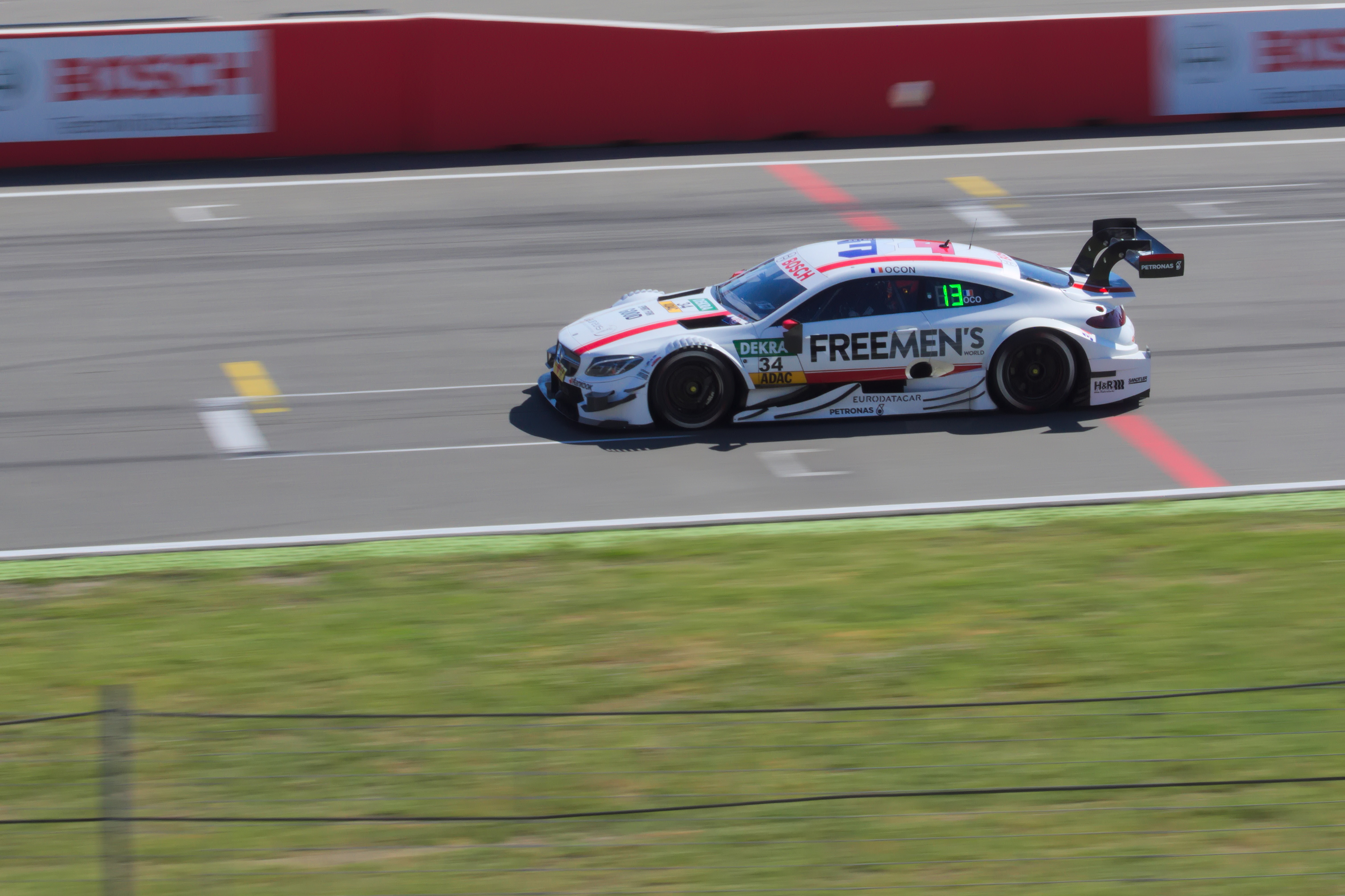 Photographie de la Mercedes-AMG C63 DTM d'Esteban Ocon lors d'une séance d'essais libres sur le Hockenheimring en DTM en 2016.